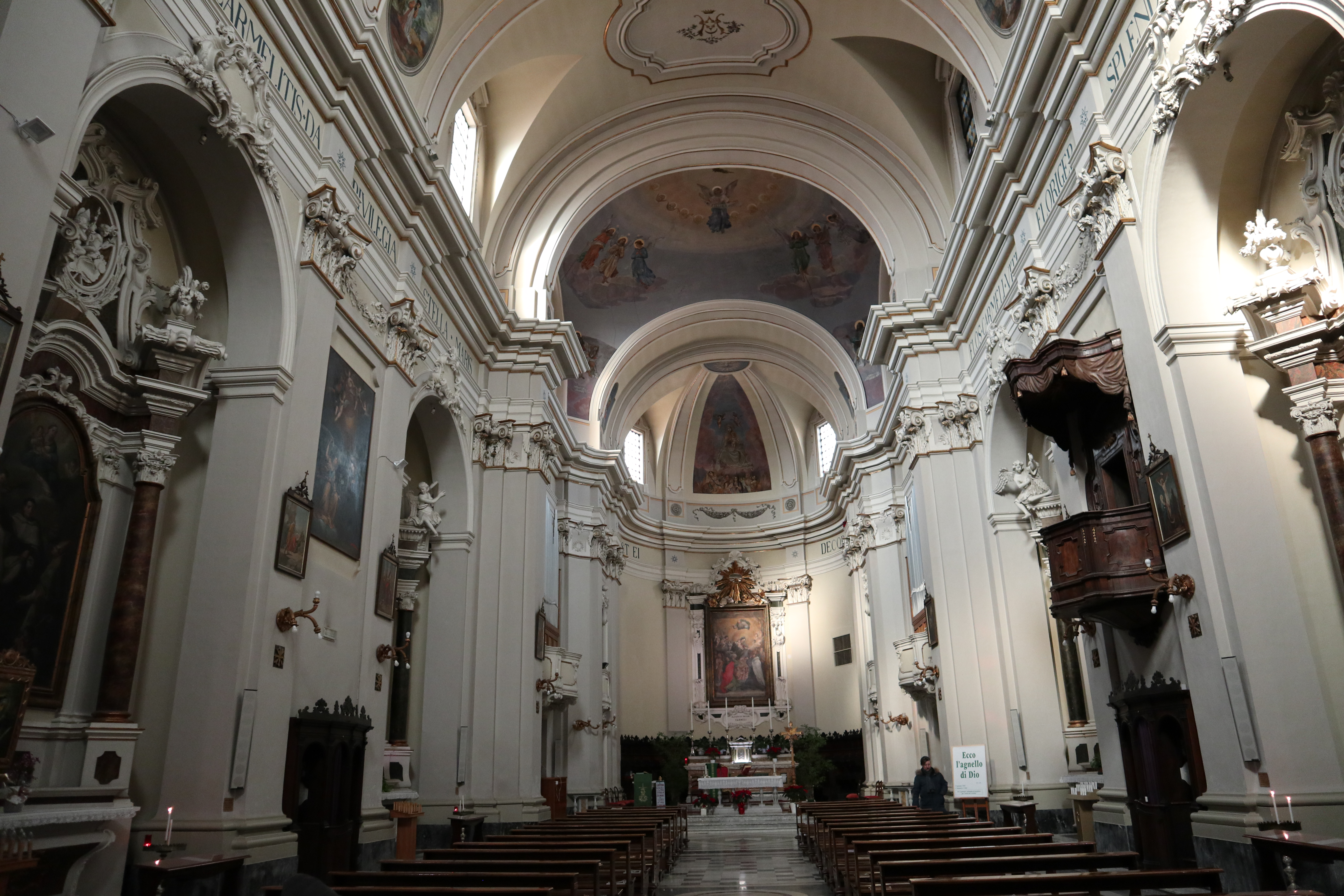 Interno barocco della chiesa.